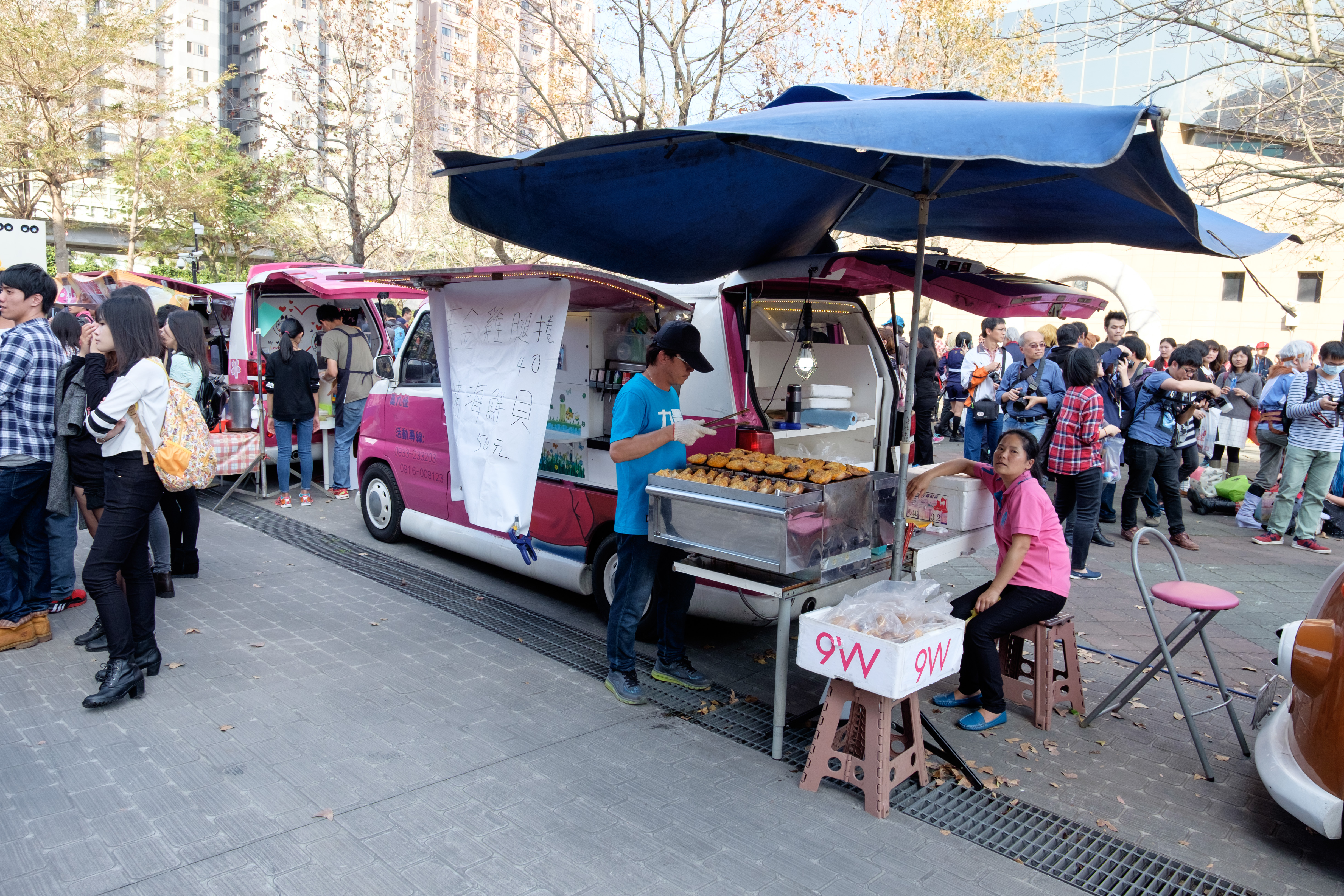 CWT42第一日下午，臺大體育館東側廣場上的真九怪黃金雞腿卷與烤海鮮貝餐車。